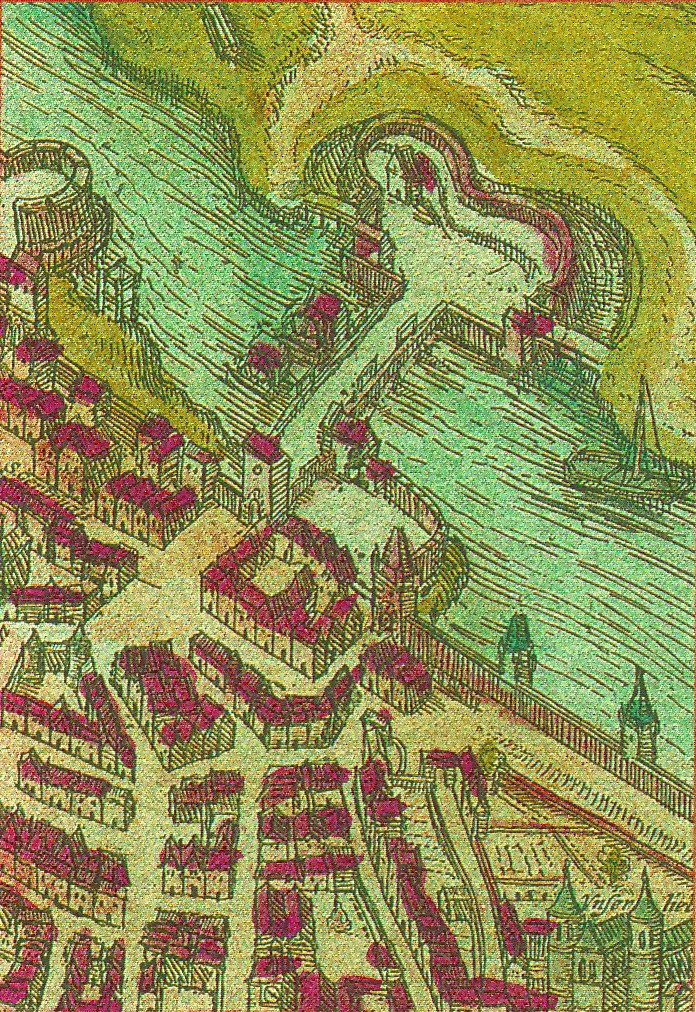 Ausschnitt aus Kupferstich, Altes Brücktor und Elbbrücke in Magdeburg, oben (Osten) Elbe und Rotehorninsel